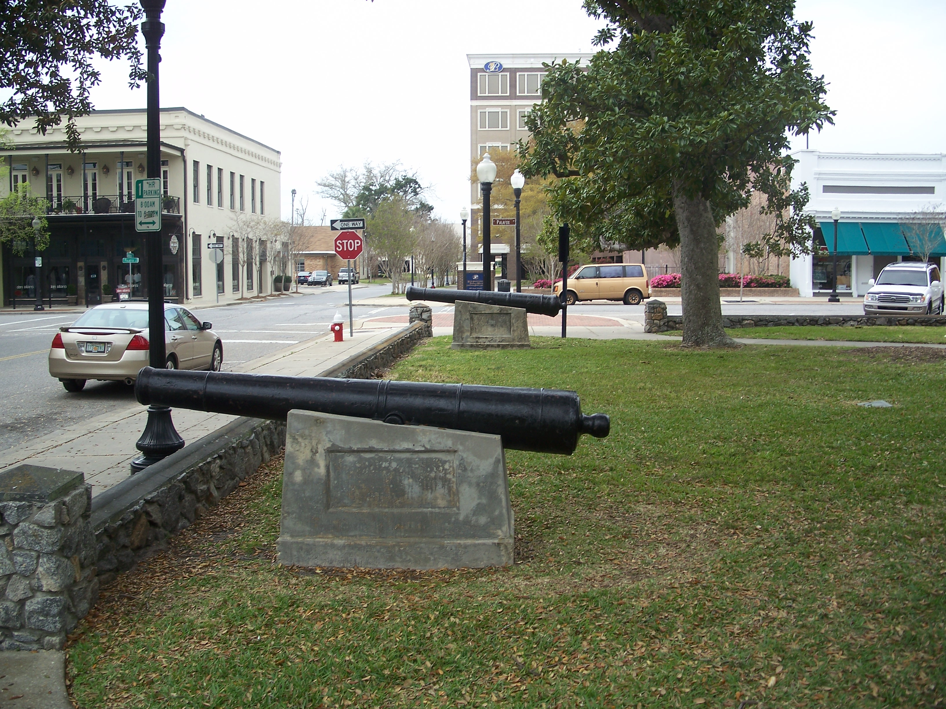 Pensacola, Florida: Plaza Ferdinand VII.